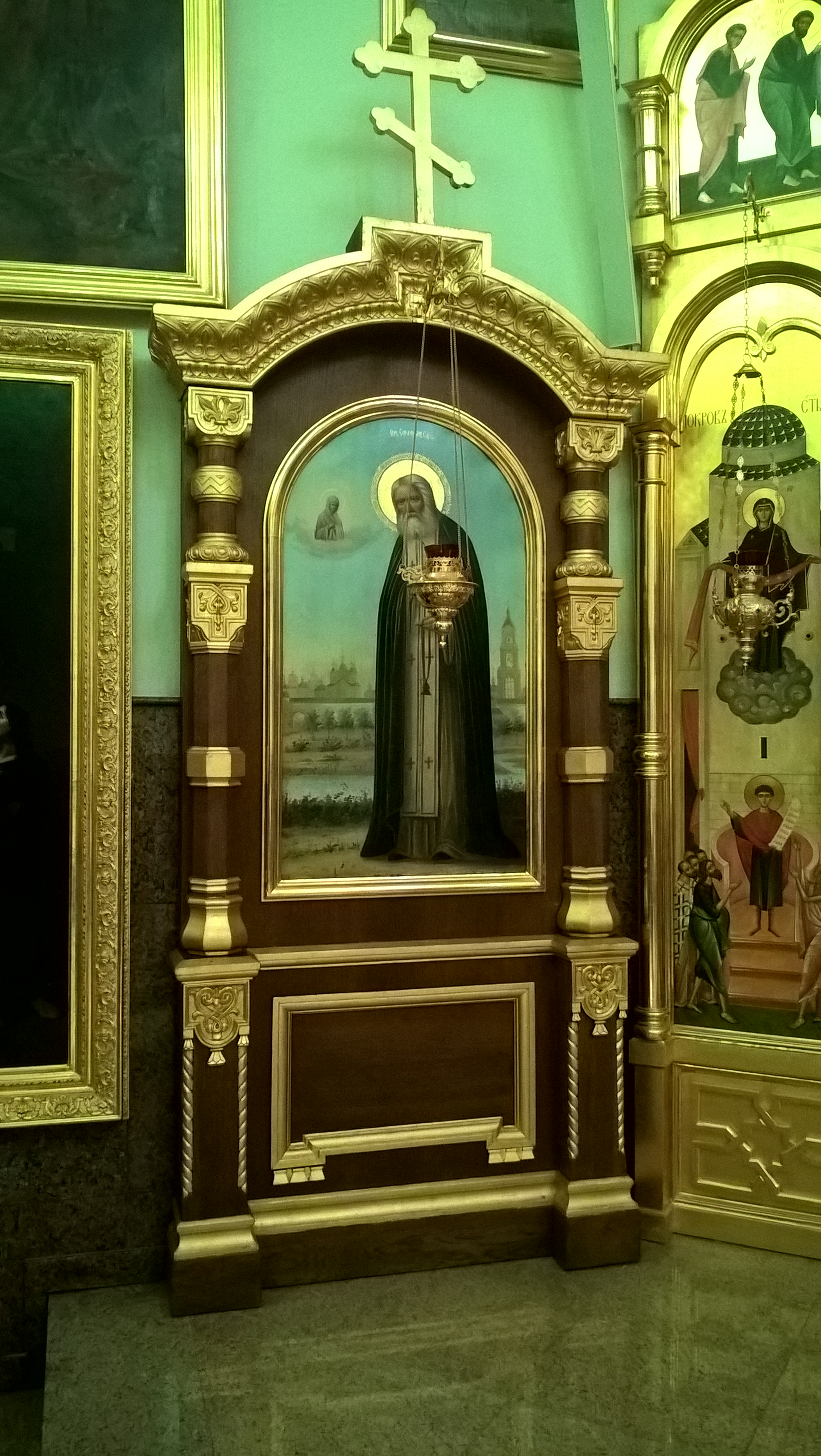 Ikona św. Serafina z Sarowa (pocz. XX w., po 1904) w cerkwi w Radomiu